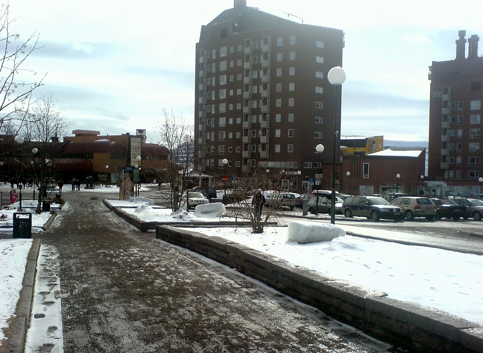 Kupoltorget - Kiruna centrum - under våren 2007. Snusdosan och Spottkoppen syns till höger.